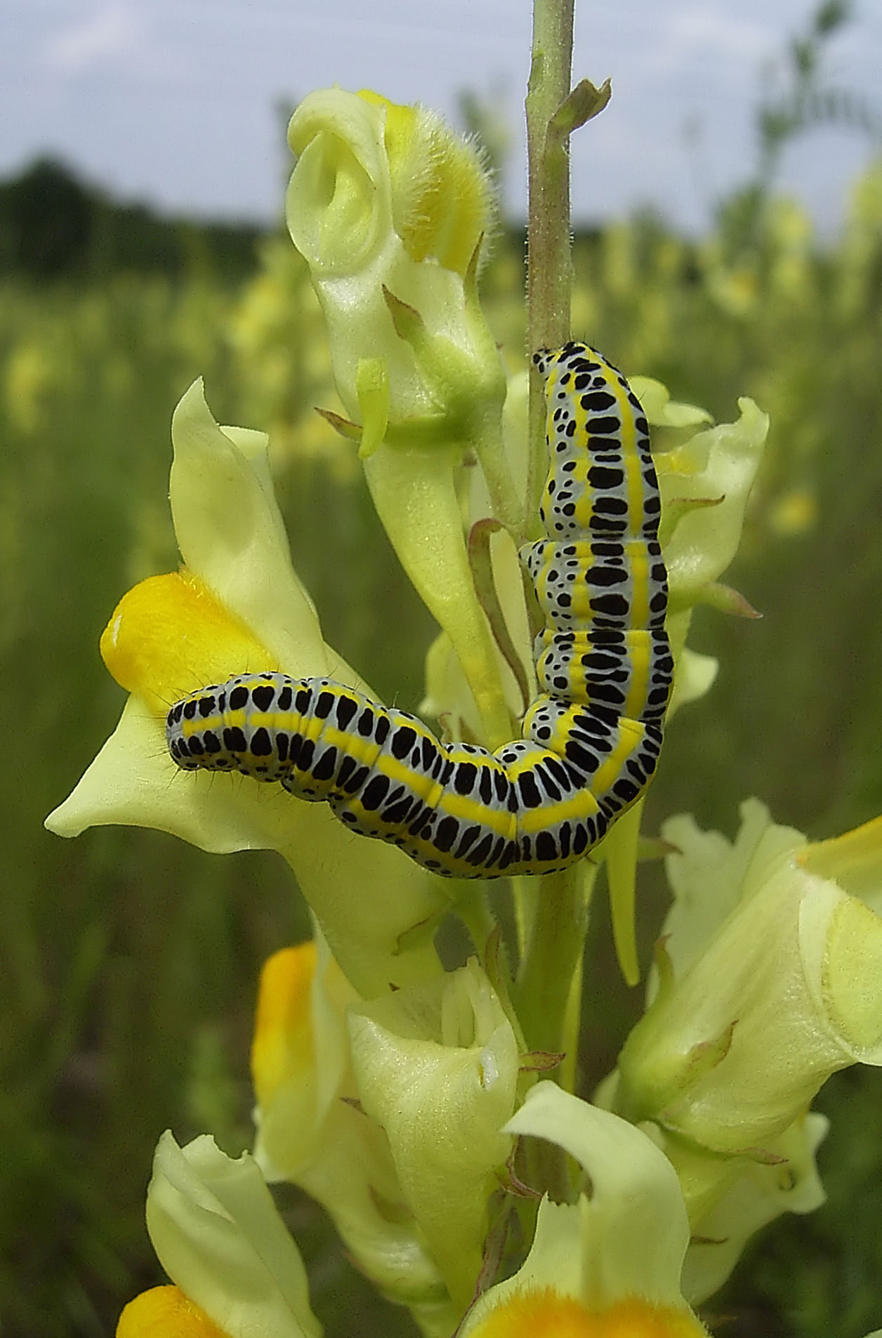 Calophasia lunula (Larva)